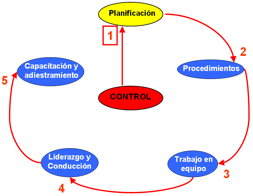 El camino de lo que necesita la organización para lograr el control de los procesos relevantes.